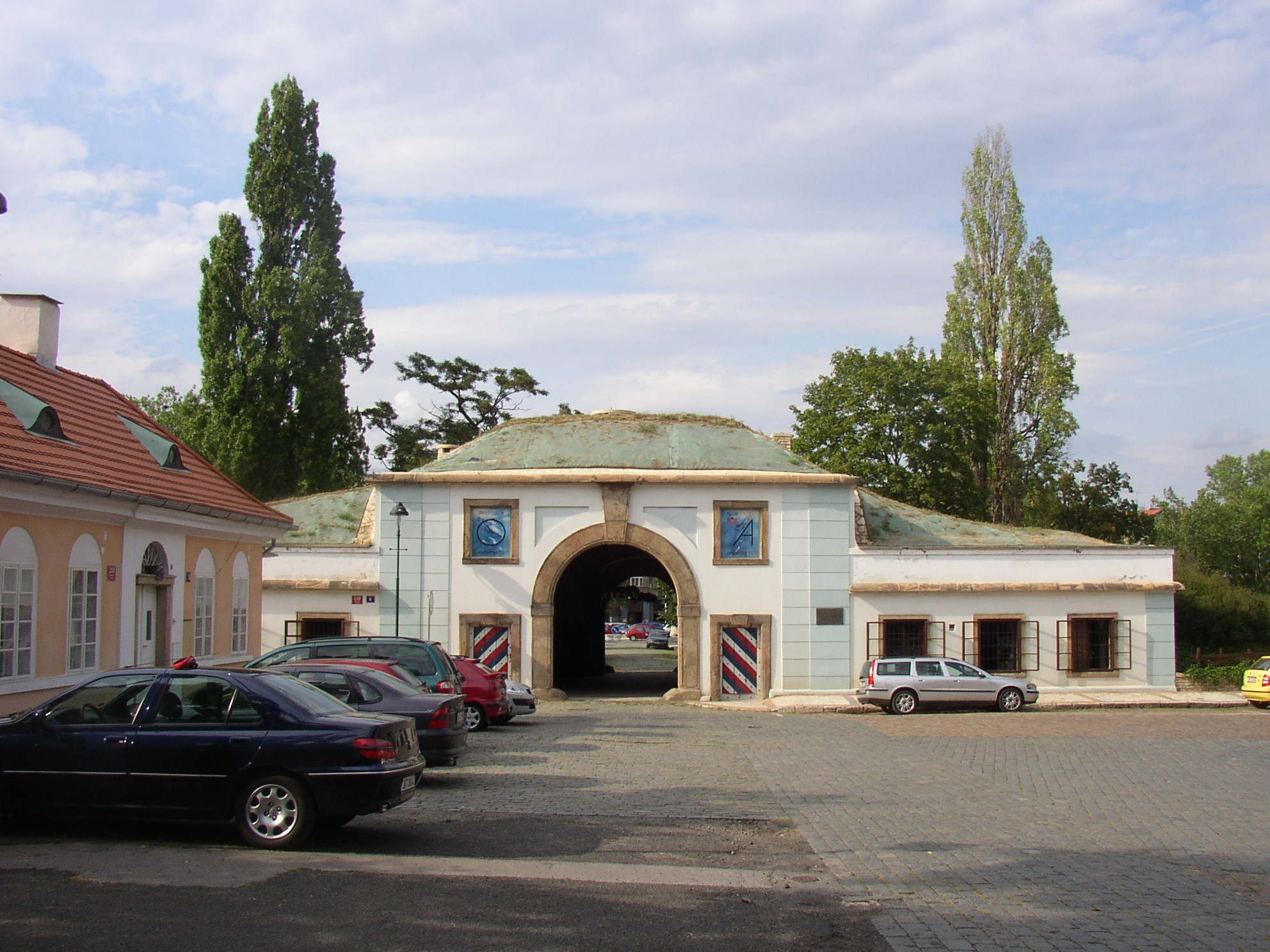 Písecká brána v Praze. Pohled z vnitřní strany.